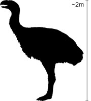 Genyornis, un oiseau préhistorique australien (silhouette)